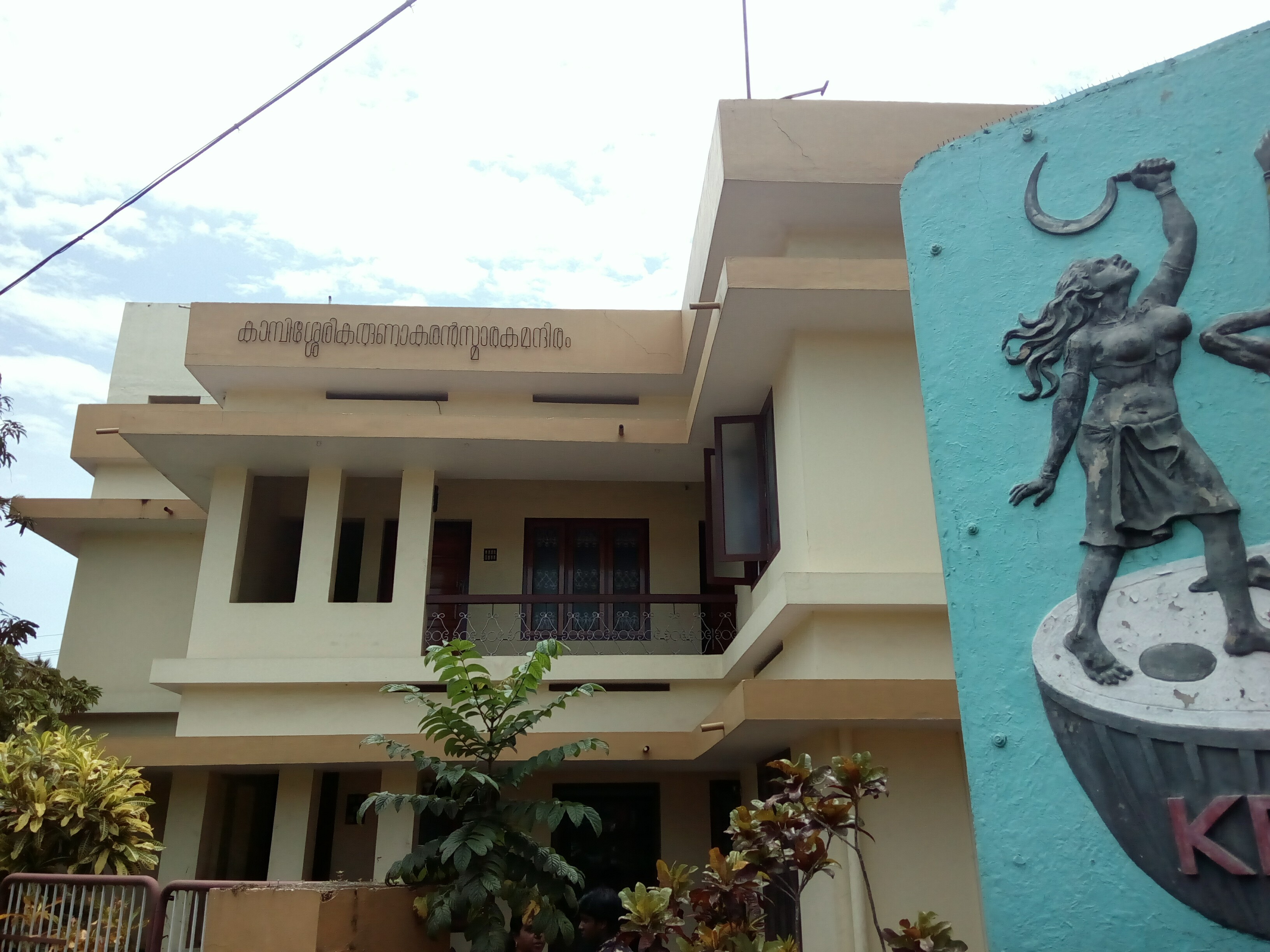 KPAC